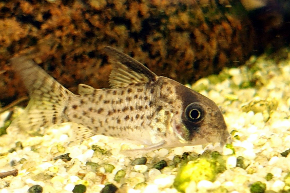 Corydoras kanei